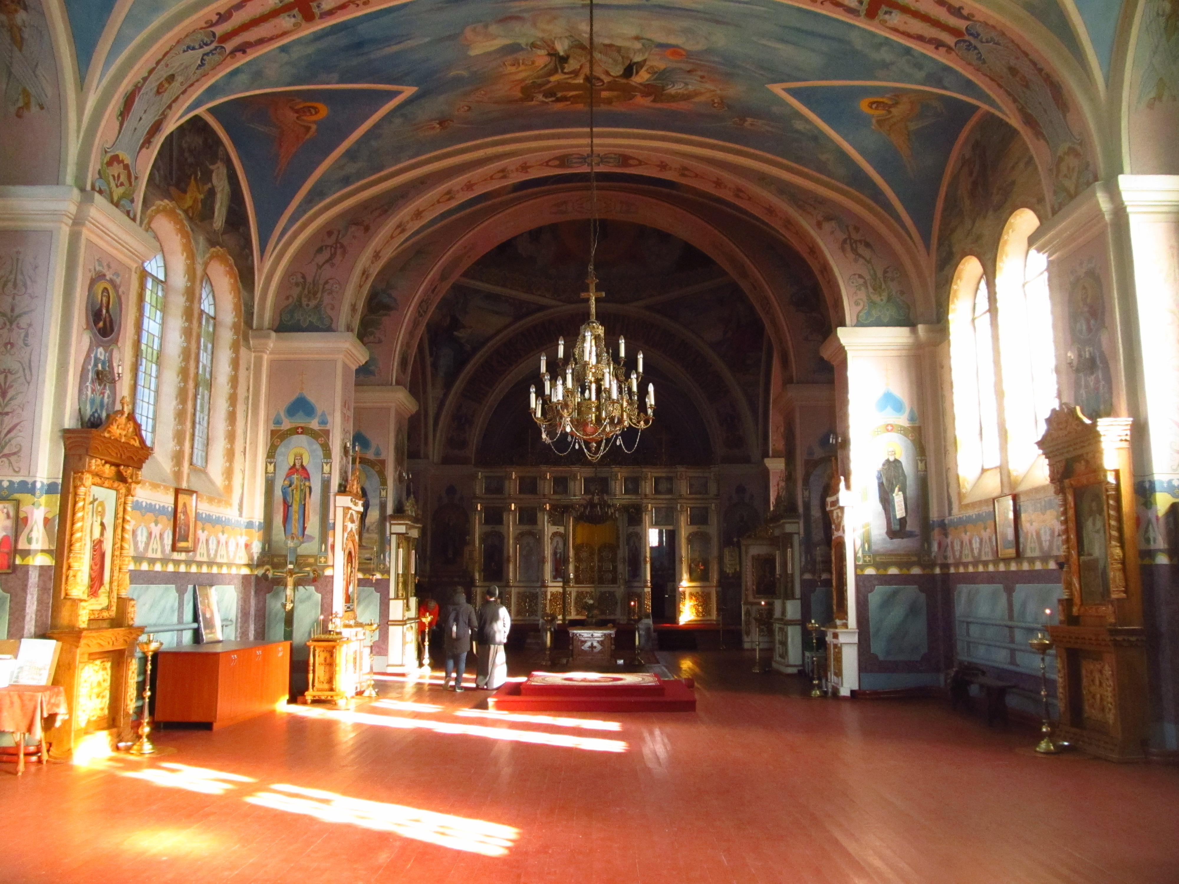 Успенський собор, Балта, вул. Ломоносова, 28